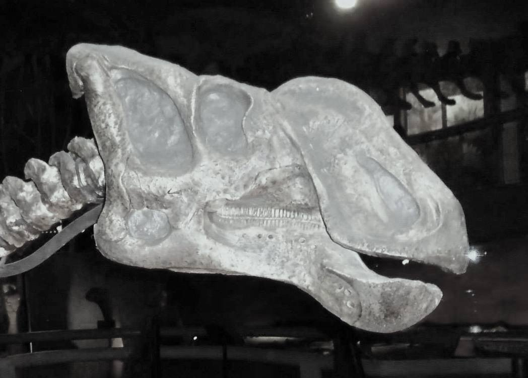 Cráneo de Latirhinus